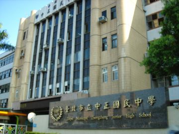 臺北市立中正國中校門